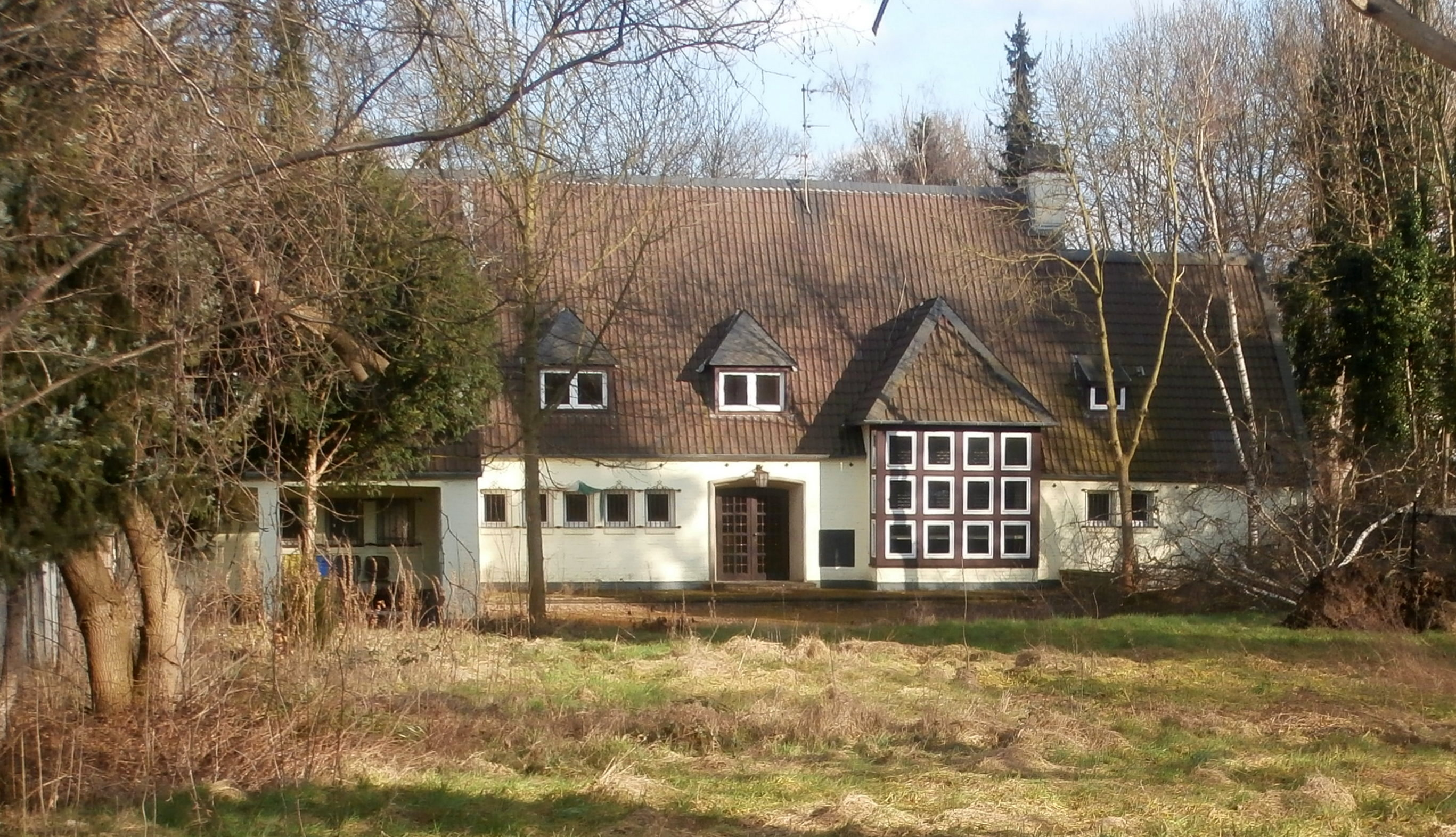 Haus Birkhof, Bonner Landstraße 119, Köln-Hahnwald